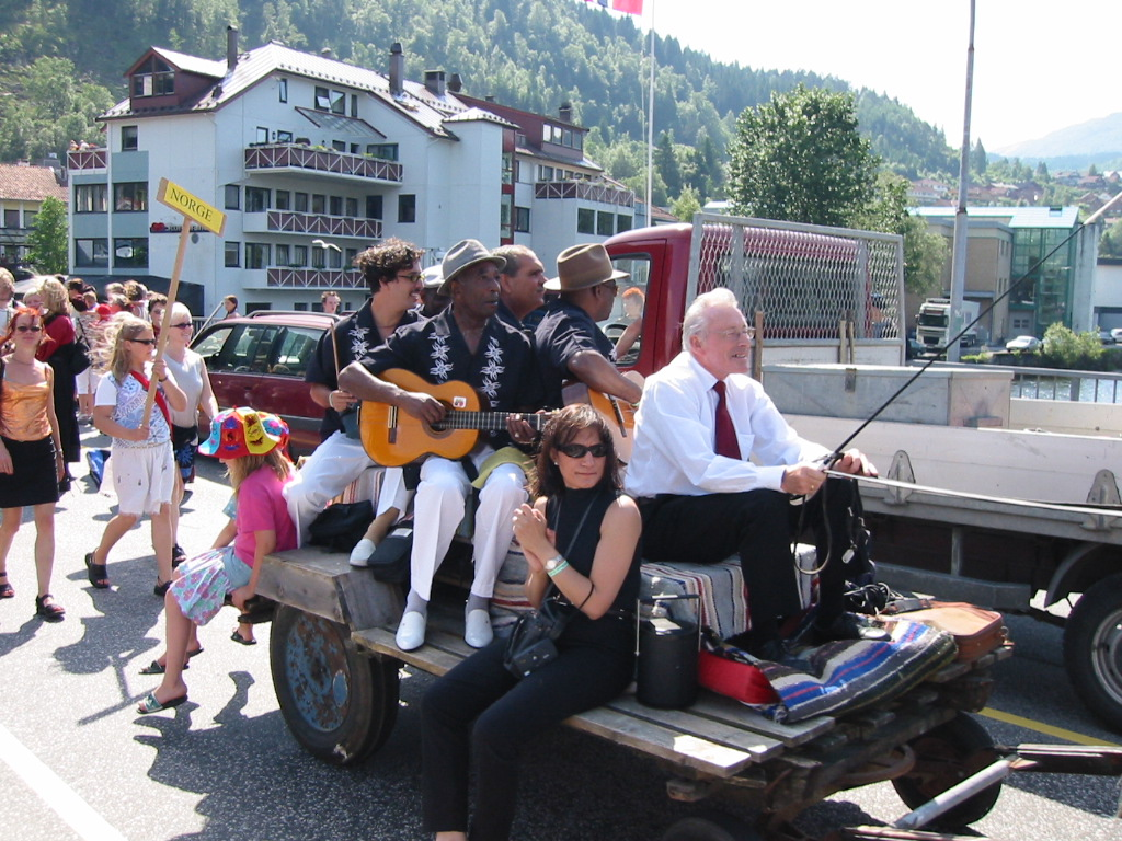 Opptog med Johannes Vie som kusk. Kubanske eldre karar med gitar m.m.